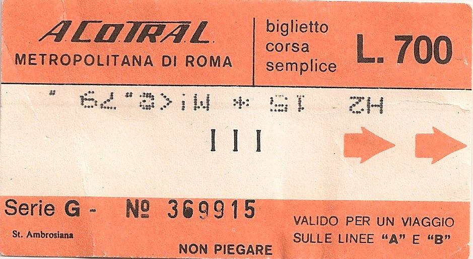 Biglietto ACOTRAL della metropolitana di Roma